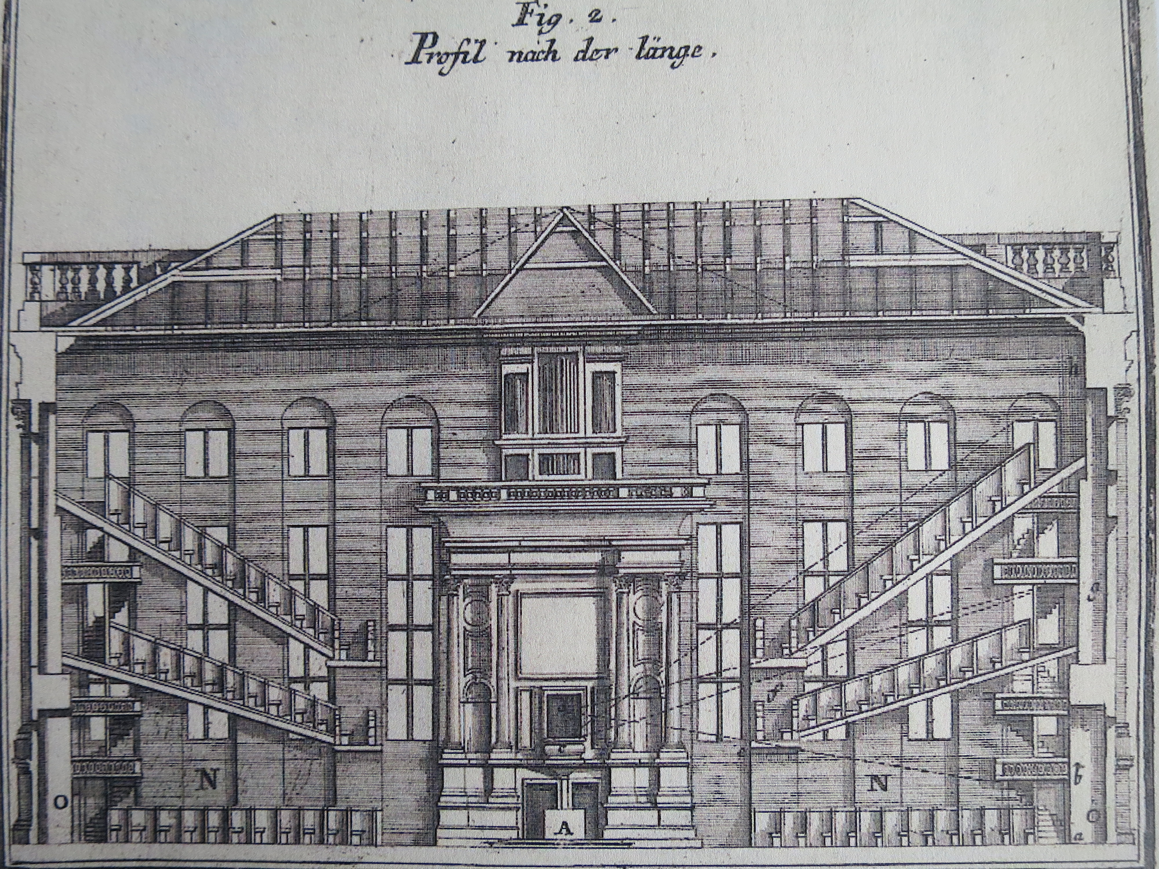 Leonhard Christoph Sturms Seitenriss einer idealen Querkirche